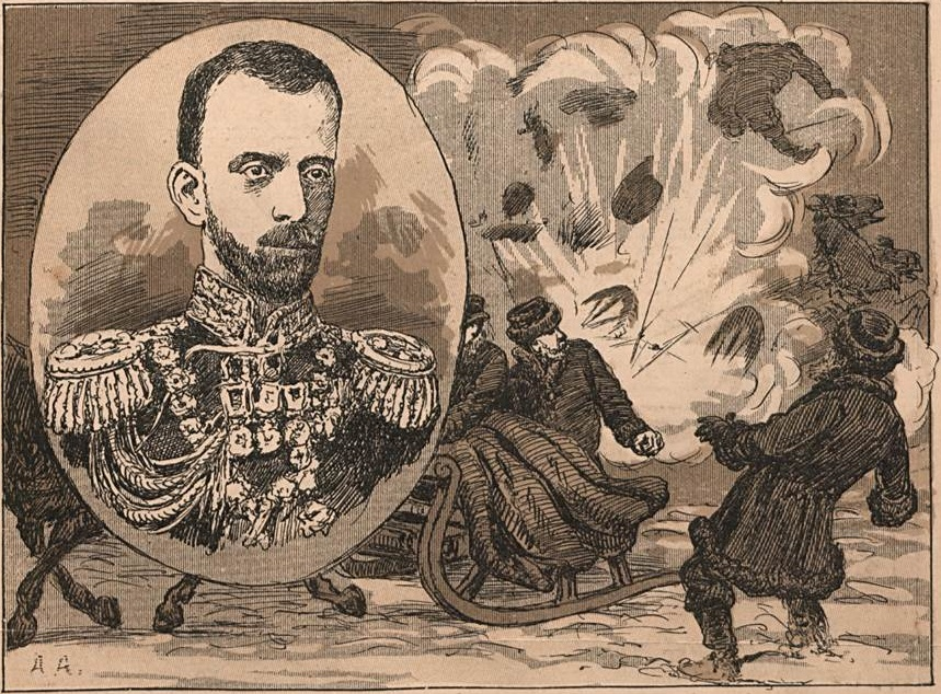 Em Moscou: Uma bomba de dinamite faz voar estilhaços o carro em que ia o Grão Duque Sergio, tio do czar, cujo corpo despedaçado foi atirado a grande distância.